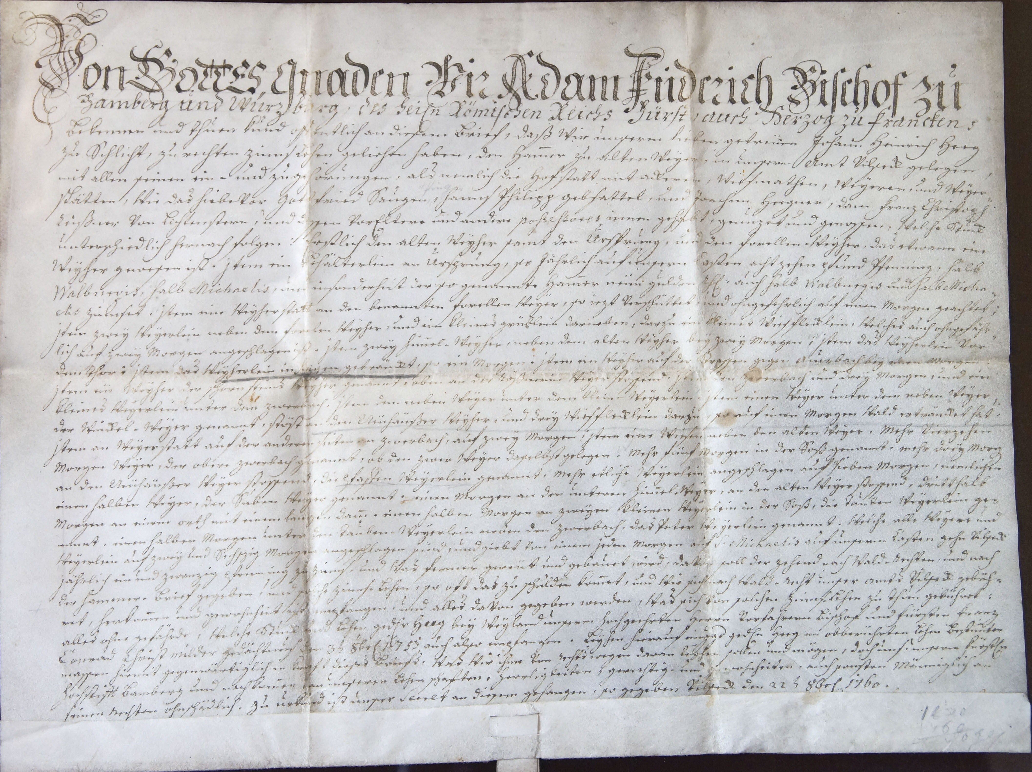 Lehensbrief des Fürstbischofs von Bamberg Adam Friedrich von Seinsheim über das Hammergut Altenweiher an Johann Heinrich Heeg 1760.